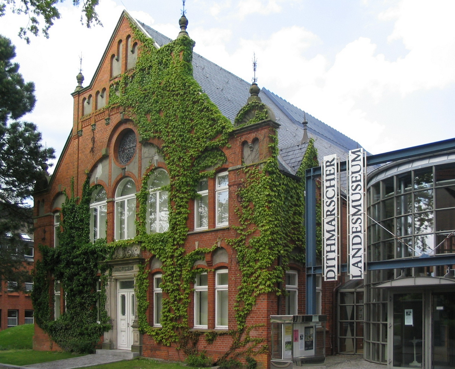 Dithmarschen Museum in Meldorf